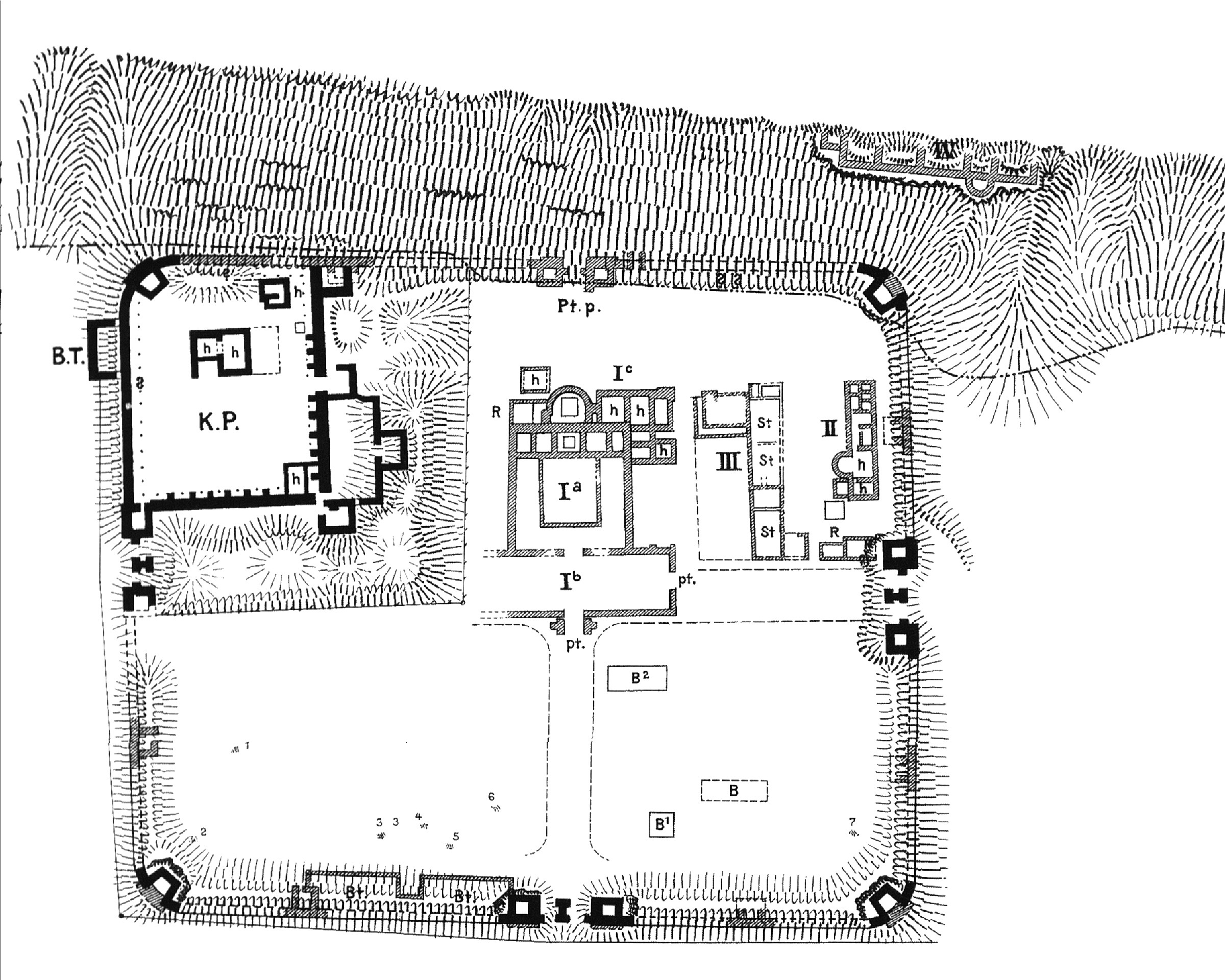 Römisches Auxiliarkastell Abusina/Eining, Ausgrabungsplan von 1903